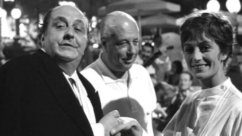 Screenshot del film 8½ (1963)